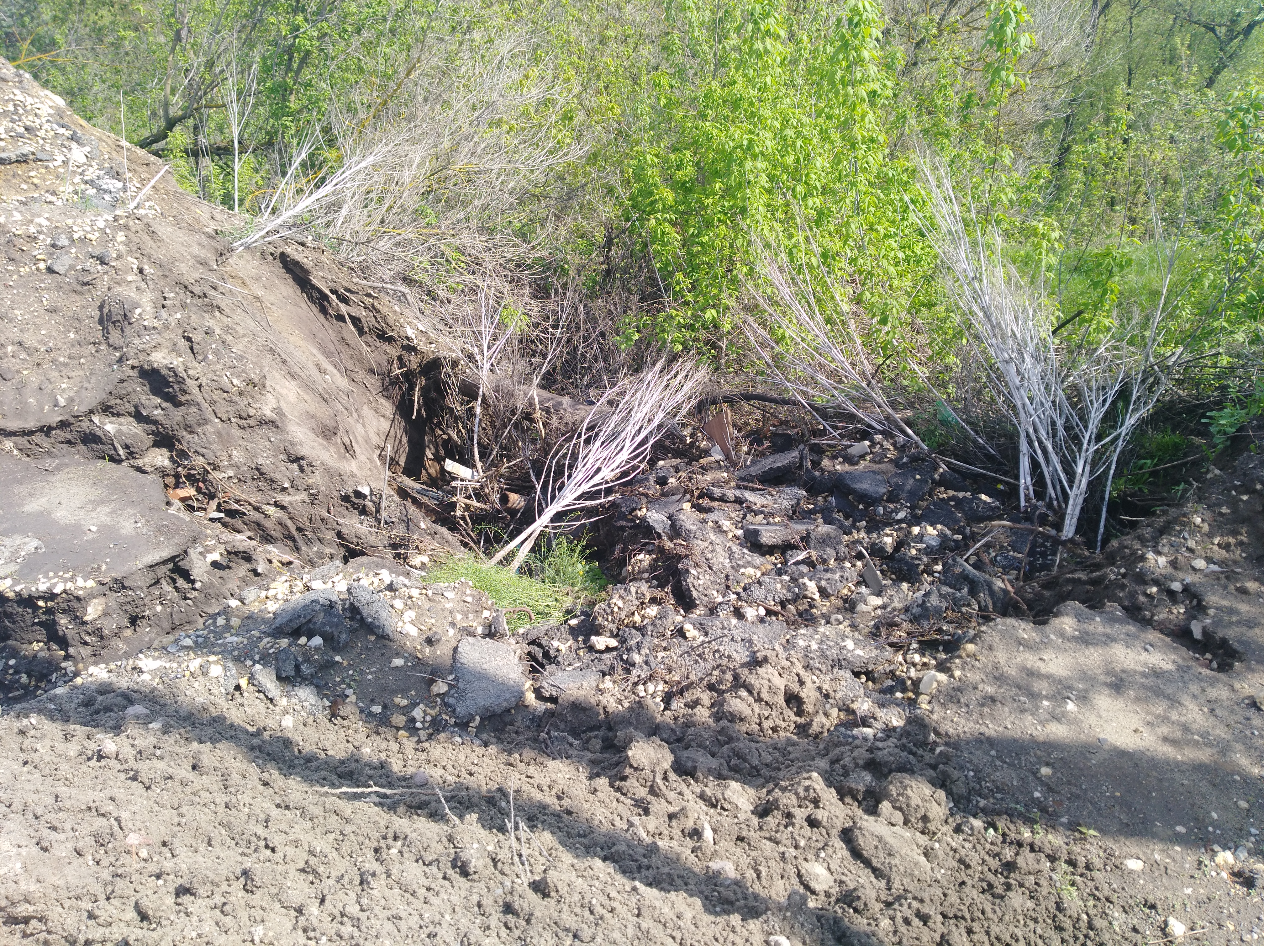 Пример деградации склонов, размыв